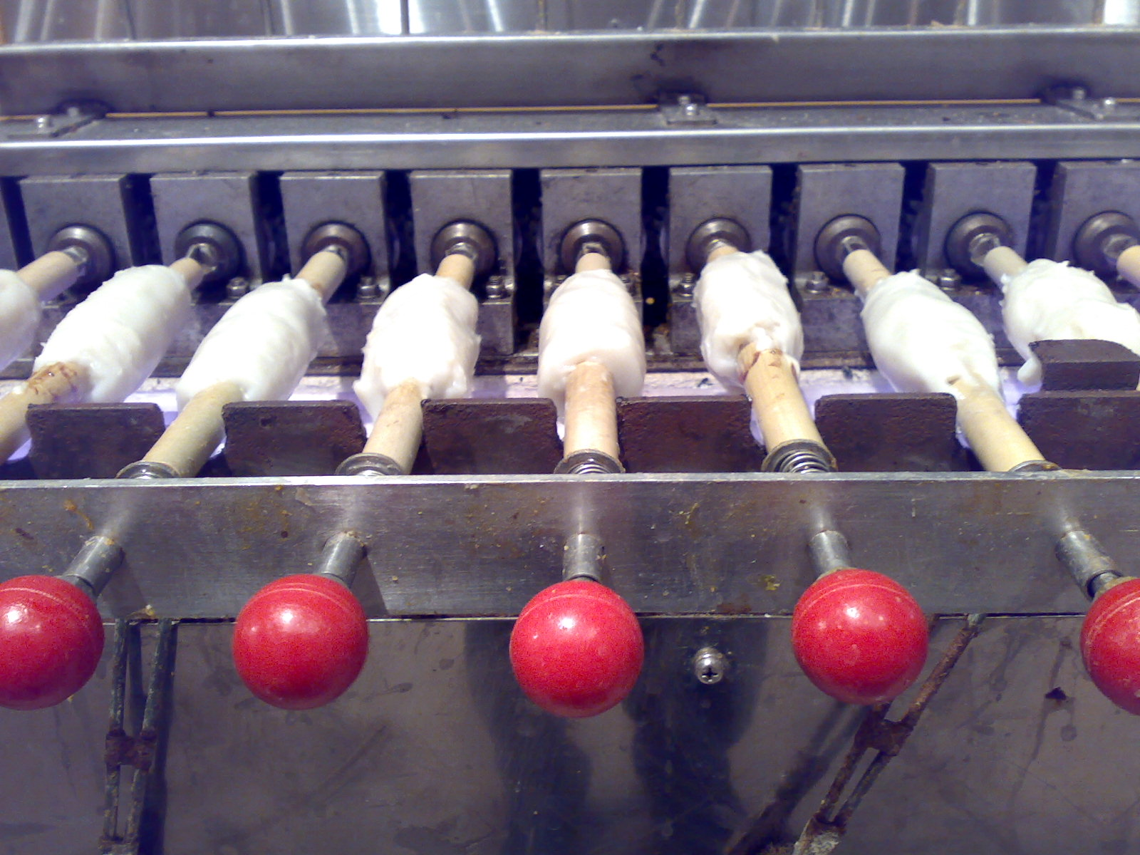 ちくわ製造マシーン。 ちくわ作りを体験しました。